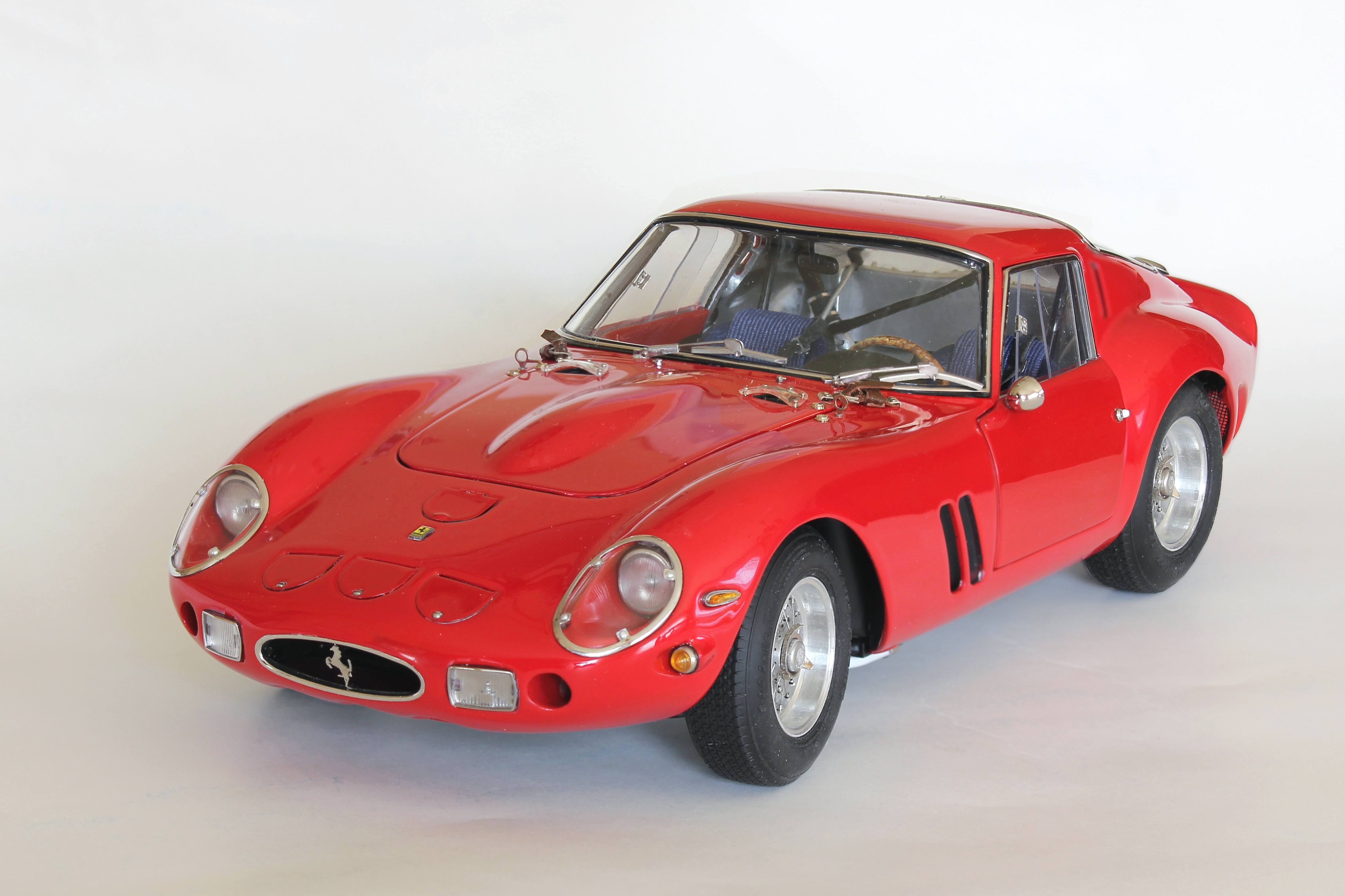 Modell eines Ferrari 250 GTO, Baujahr 1962, von CMC